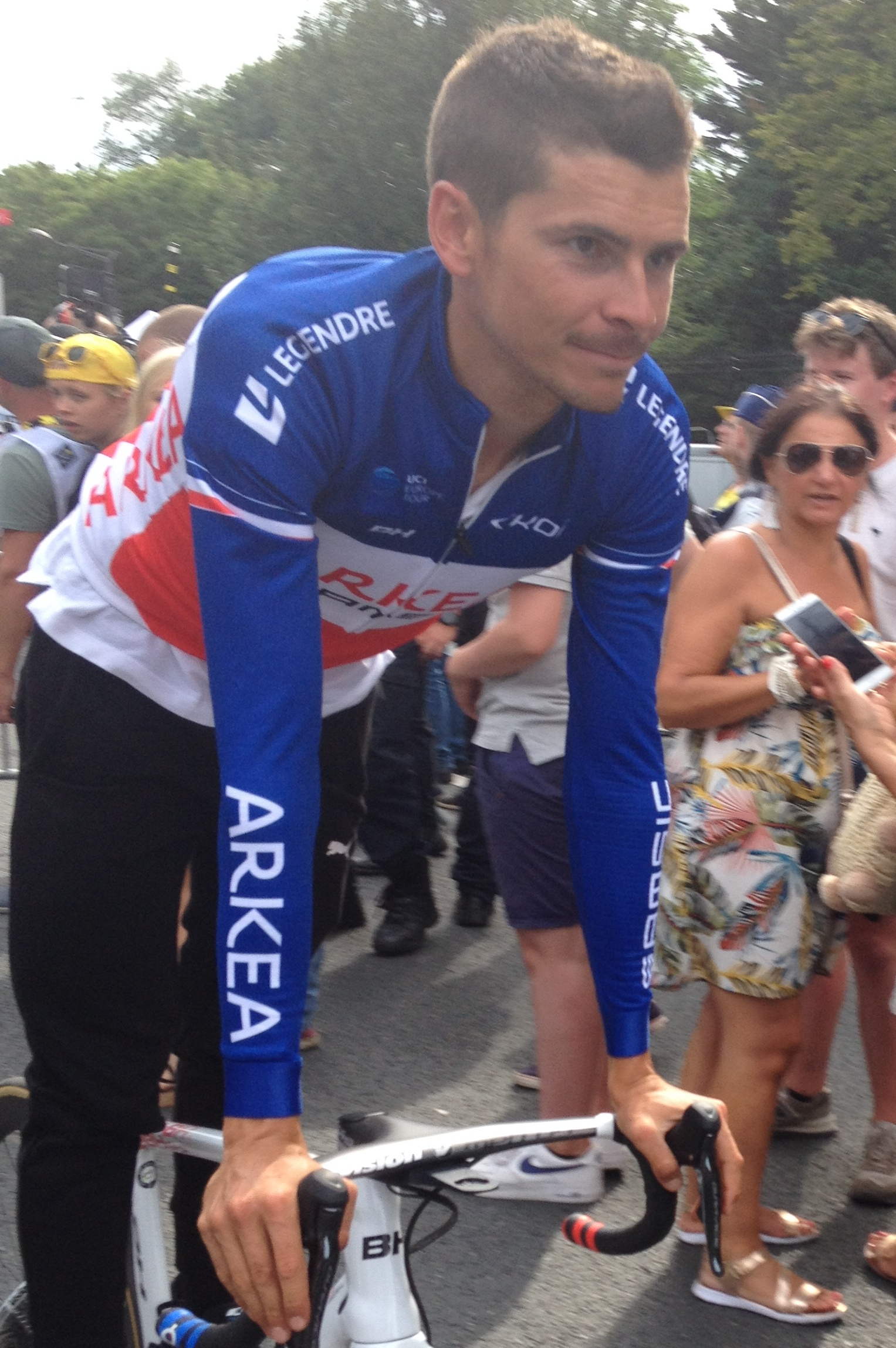 Grand Départ van de Tour de France in Brussel, finish in Laken op zaterdag 6 juli 2019